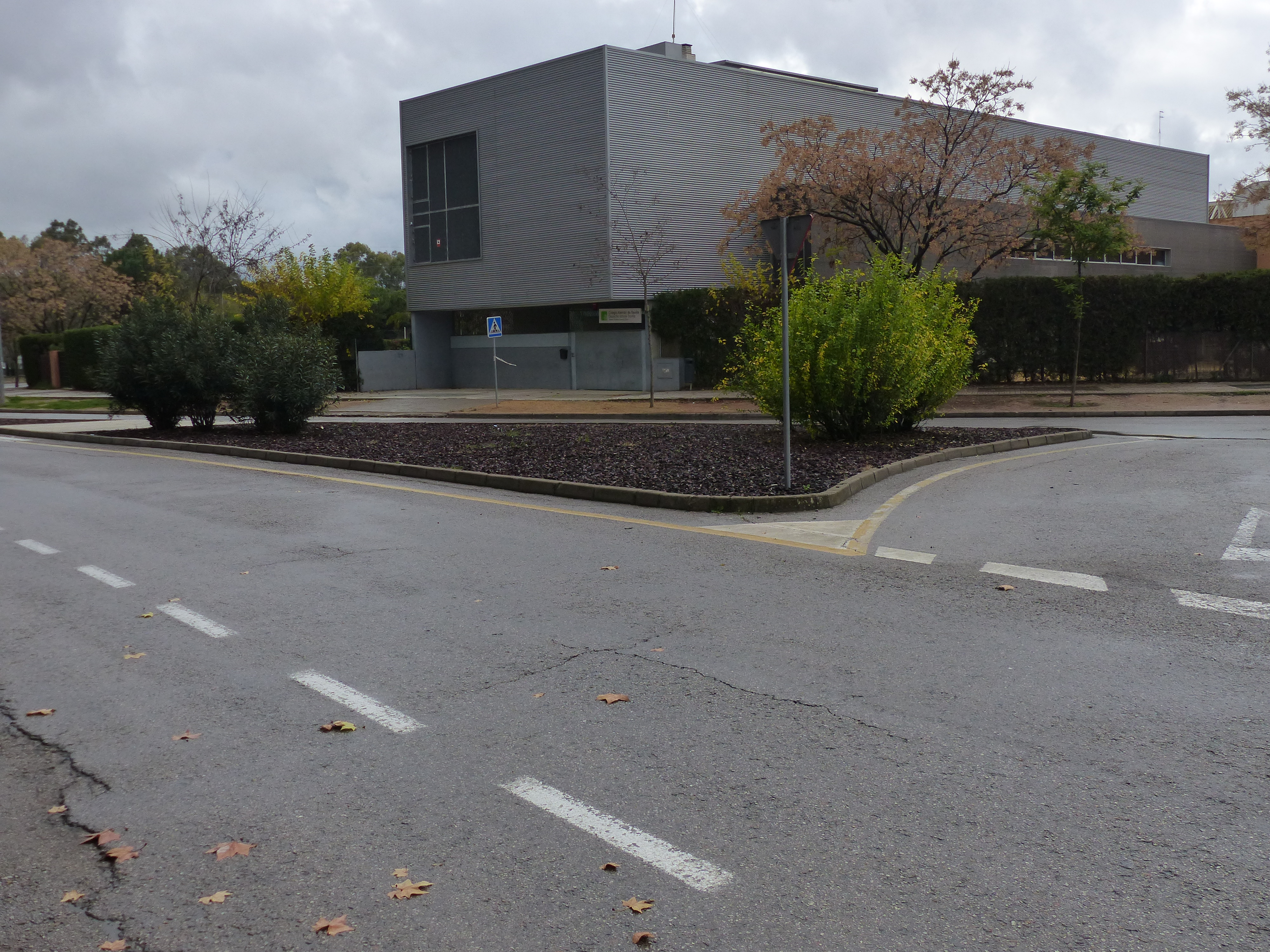 Colegio Alemán Alberto Durero